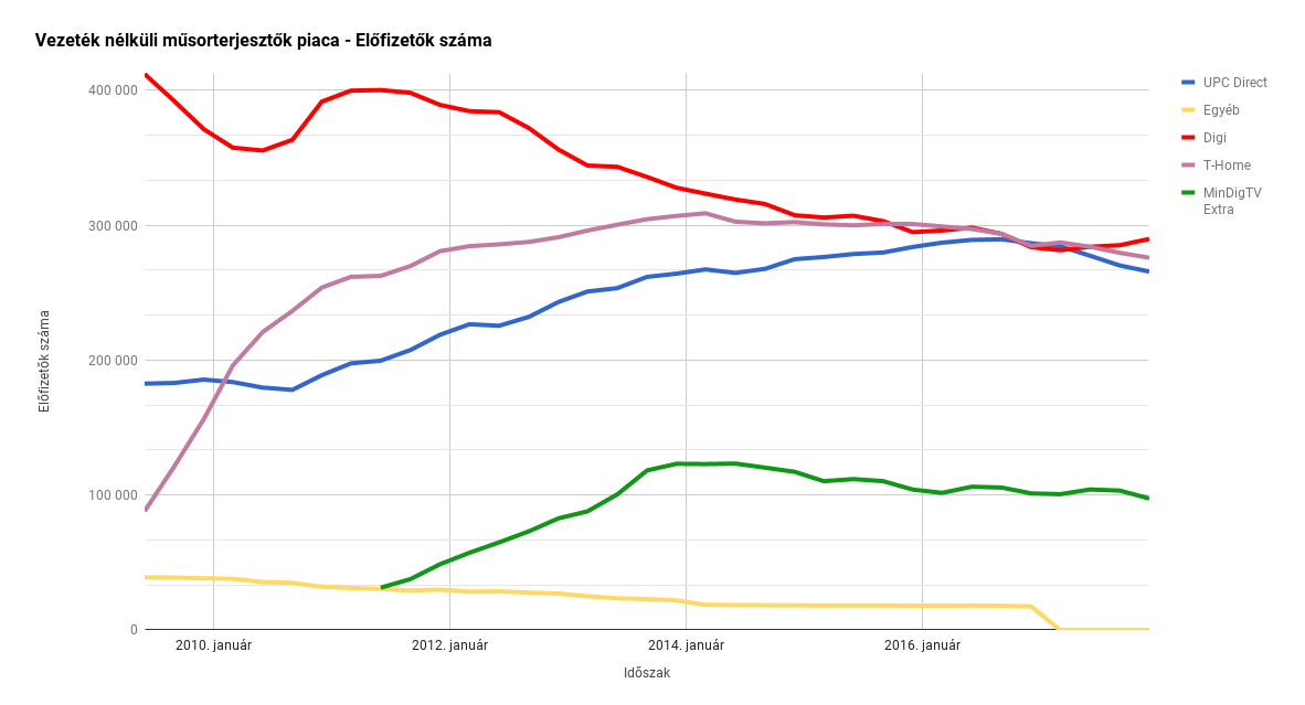 Vezeték nélküli műsorterjesztő szolgáltatók előfizetői számának változása